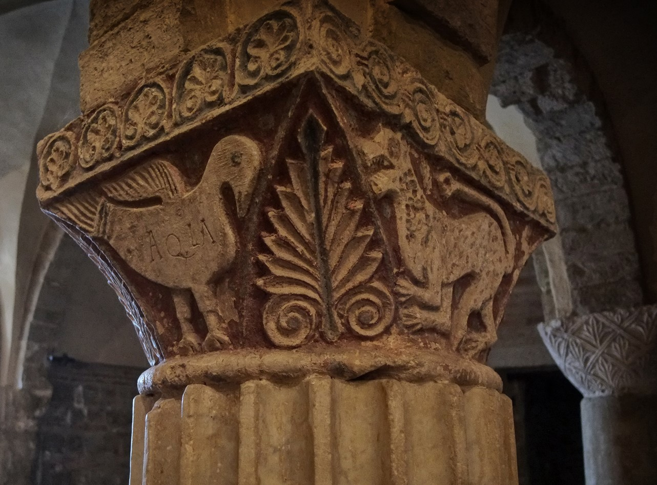 Uno dei capitelli scolpiti presenti nella cripta dell'Abbazia di Rambona